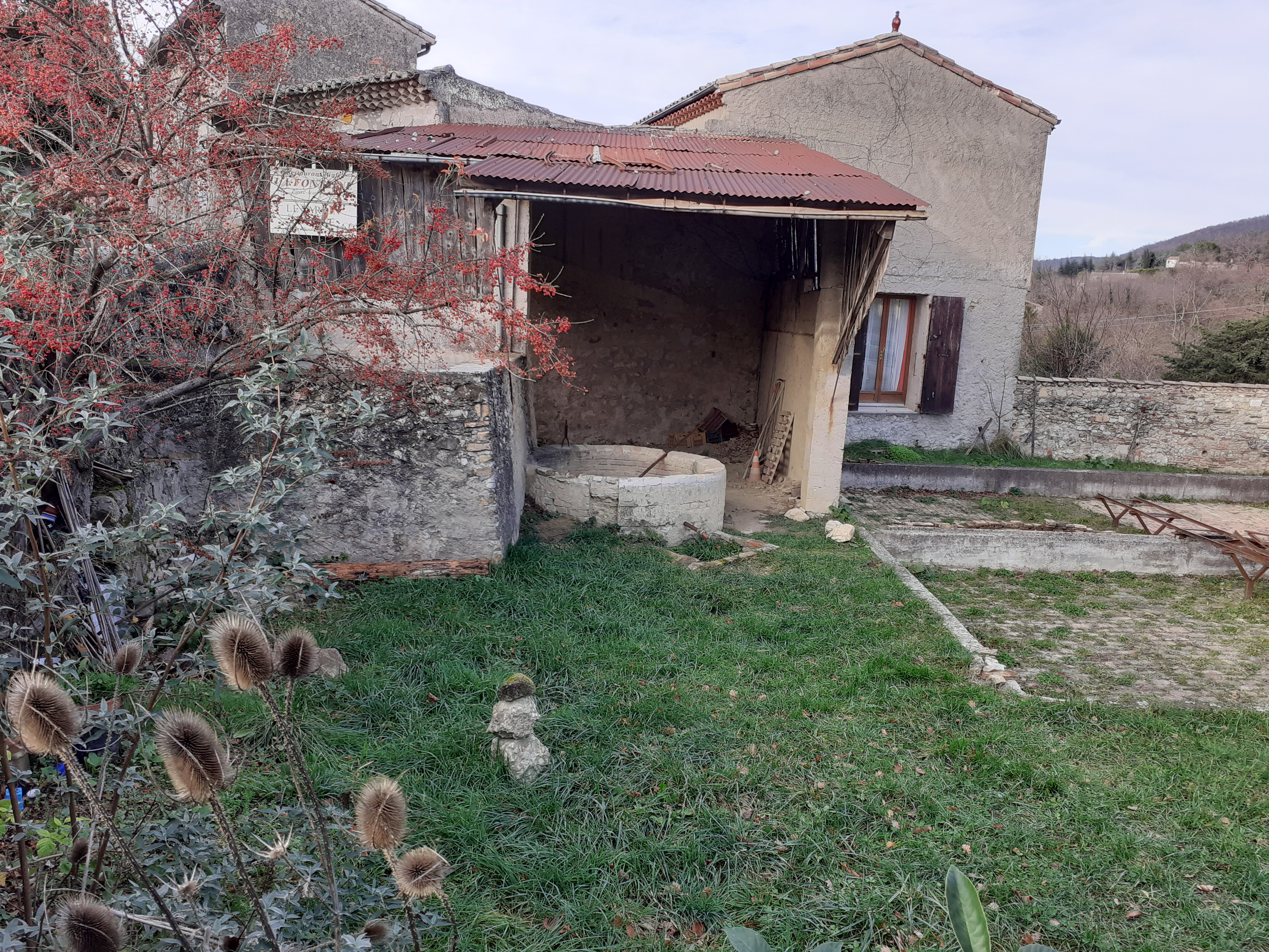 Parcelle du Petit Maupas sur laquelle était préparée l'argile avec travail à la poterie